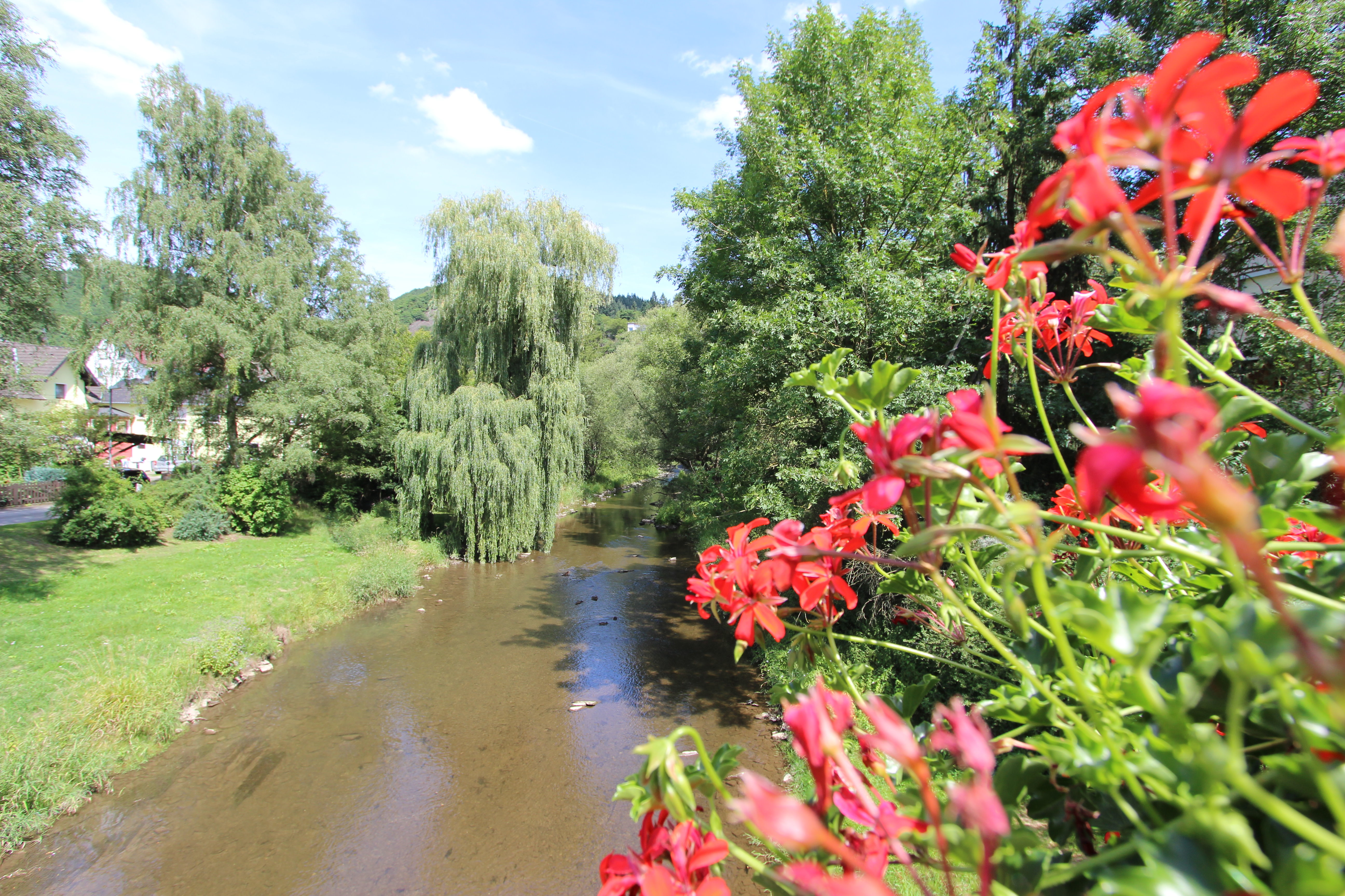 53520 Schuld, Brücke Domhofstraße über die Ahr. Aufnahme von 2017.